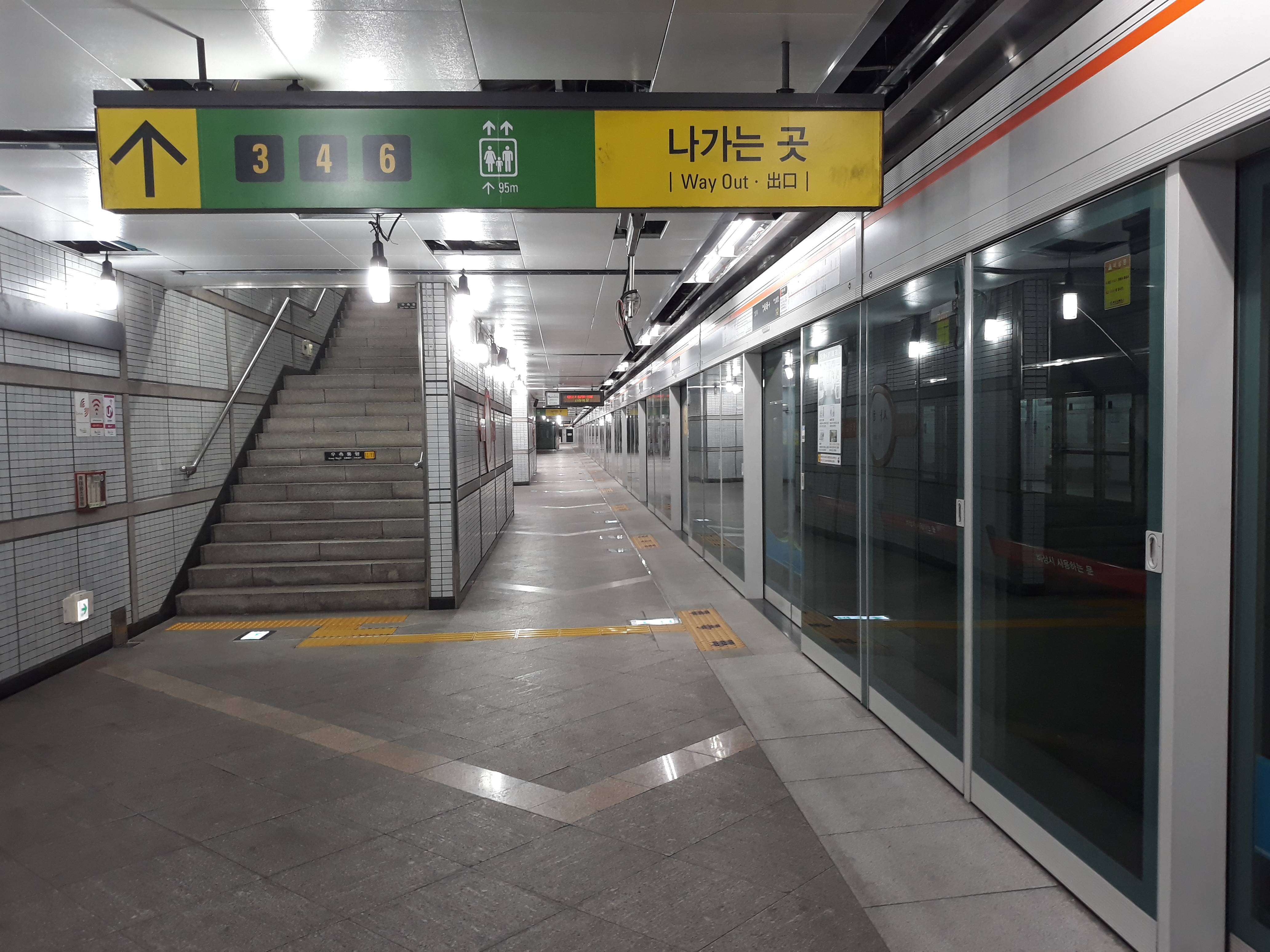 부산 도시철도 1호선 사하역 노포 방면 승강장